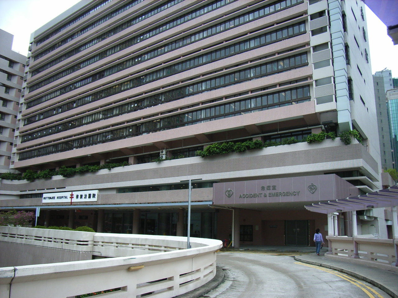 律敦治醫院 Ruttonjee Hospital BY RICHARD MARTIN.